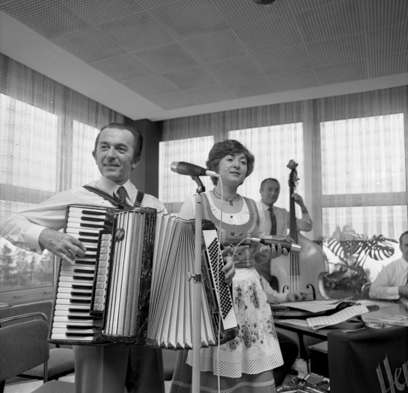 Herbert Roth ADN-ZB-Schaar 15.4.1981 Nach dem zündenden Rennsteiglied vor 30 Jahren scharte Herbert Roth eine kleine Gruppe Gleichgesinnter mit Kontrabaß, Zither und Gitarre um sich. Dazu kam Waltraud Schulz, die sich heute übrigens mit dem Nachwuchs Karin Roth bei den Auftritten abwechselt. Unser Foto zeigt Herbert und Tochter Karin bei einem der jüngsten Auftritte. (GND 119429756) Abgebildete Personen: Roth, Herbert: Komponist, Sänger, Leiter einer Instrumentalgruppe, DDR